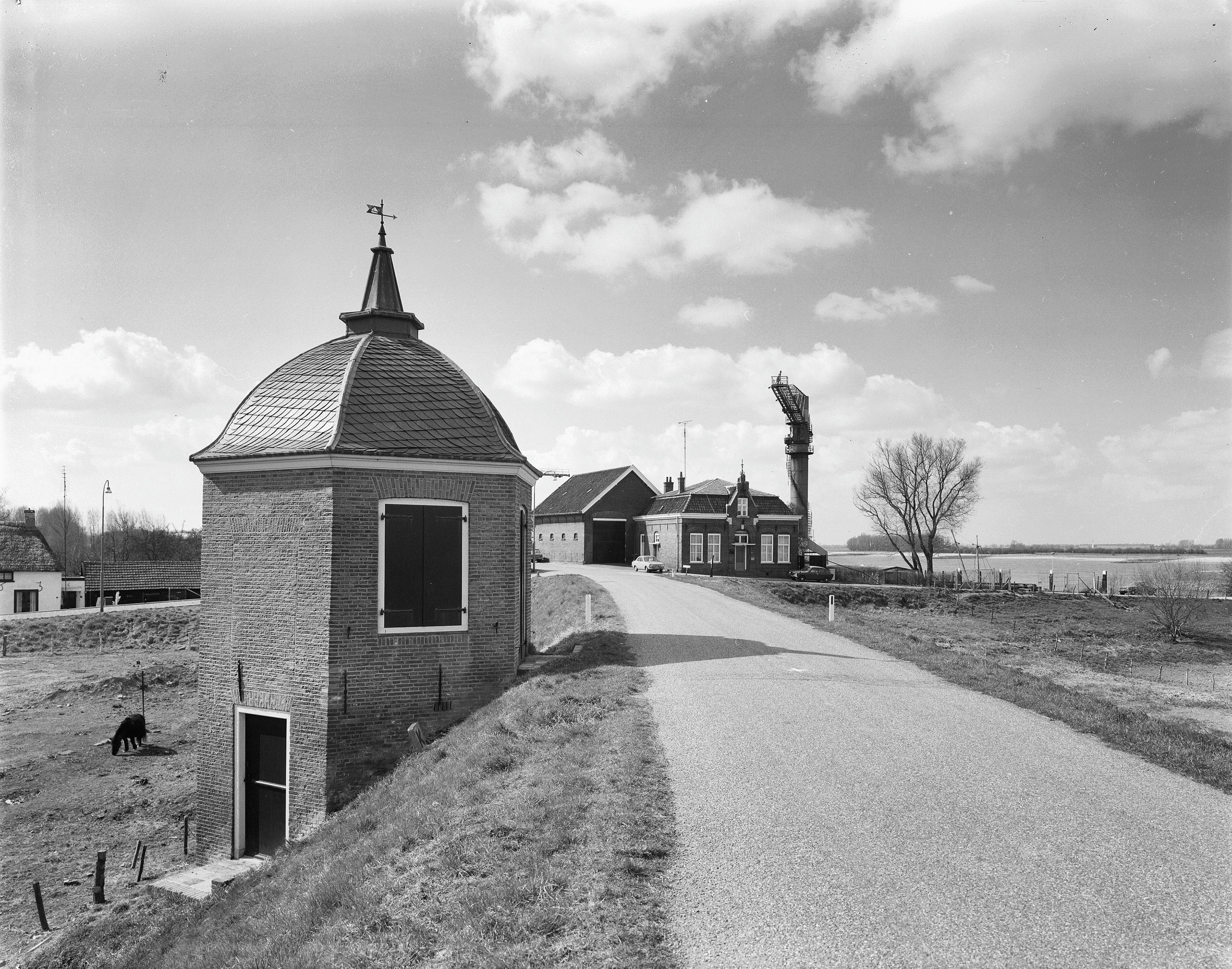 tuinkoepel